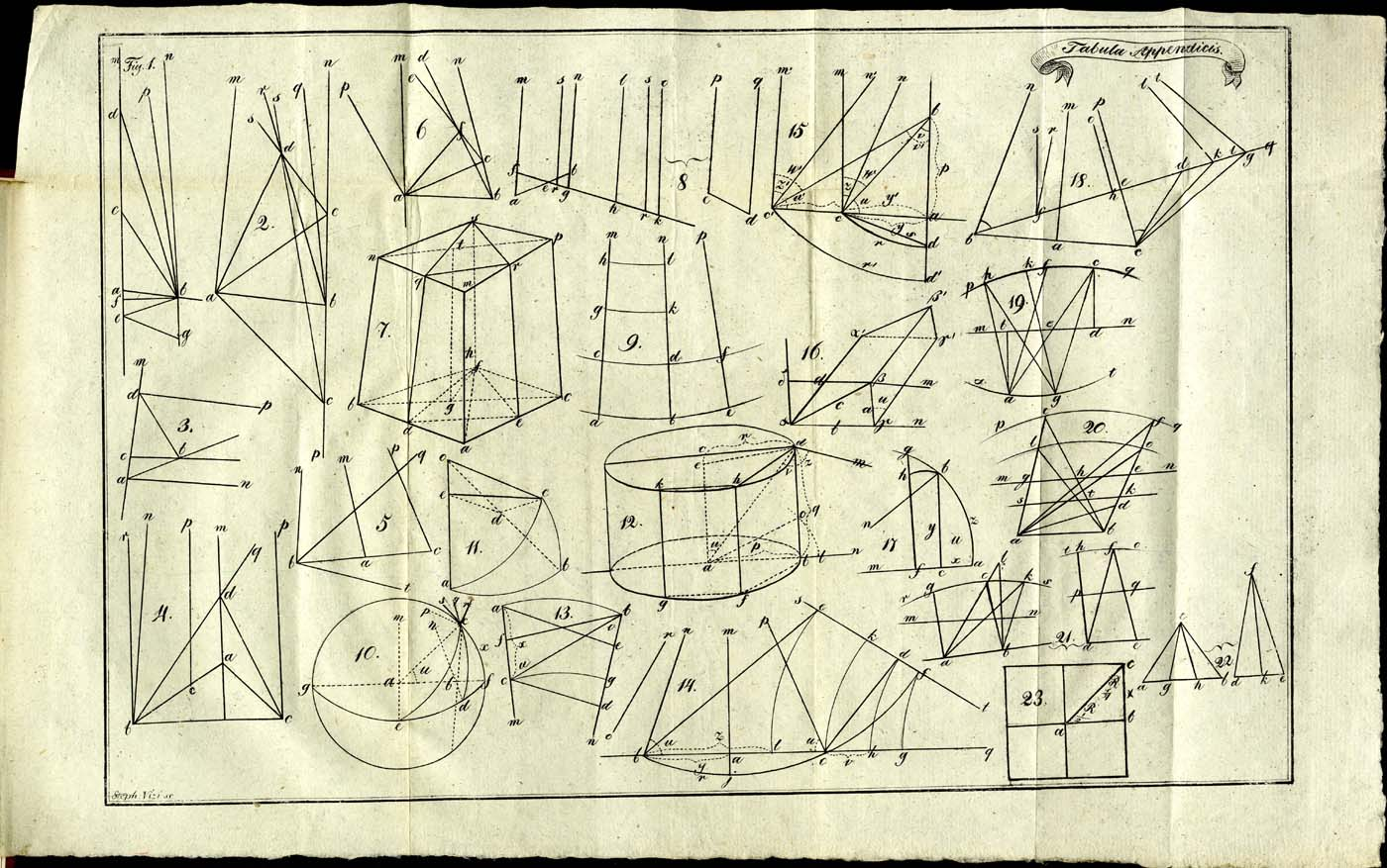 Az idősebb Bólyai (Farkas) Tentamen cimű műve második kötetének függelékeként megjelent matematikai alapmű az Appendix Scientiam Spatii absolute veram exhibens egy lapja